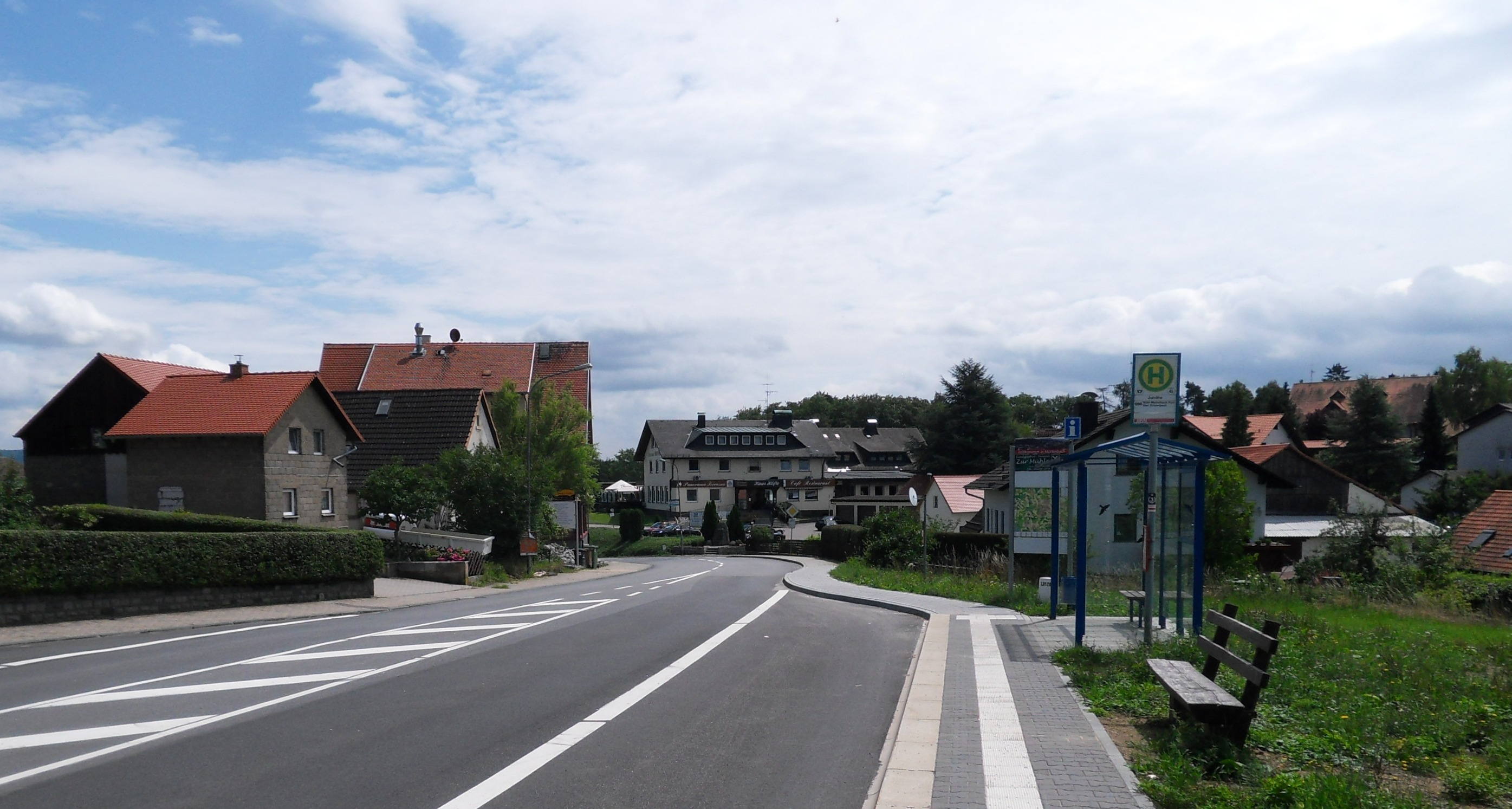 Ortsteil Juhöhe in Mörlenbach im Odenwald vom Ortsrand im Westen gesehen